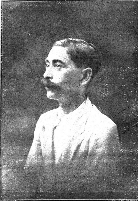 Unique photo of Premchand